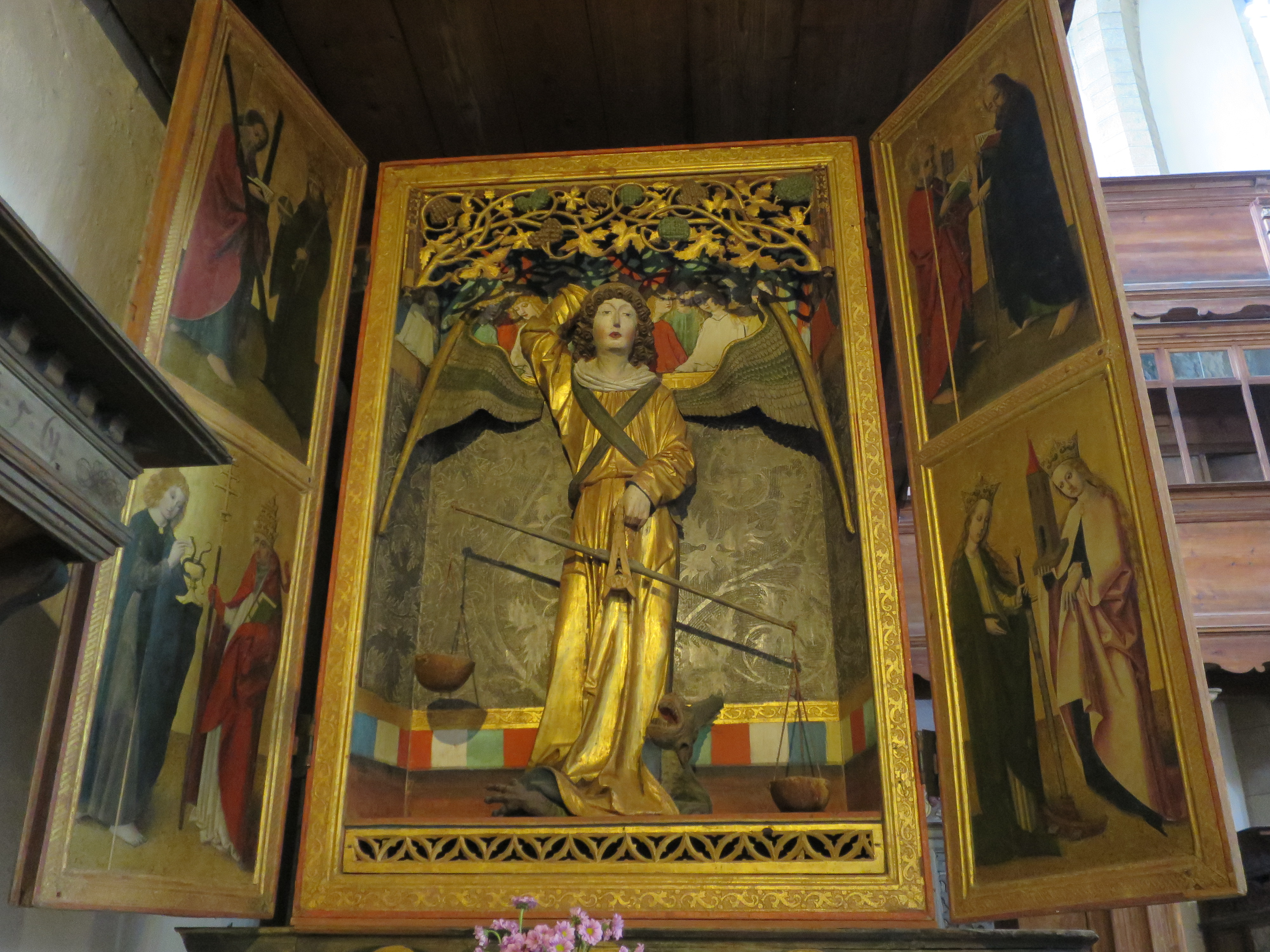 Im Mittelschrein der Erzengel Michael. Auf den Flügelnː oben links Apostel Andreas und König Sigismund, unten Ev. Johannes und Papst Gregor. Oben rechts Petrus und Paulus, unten Katharina und Barbara.